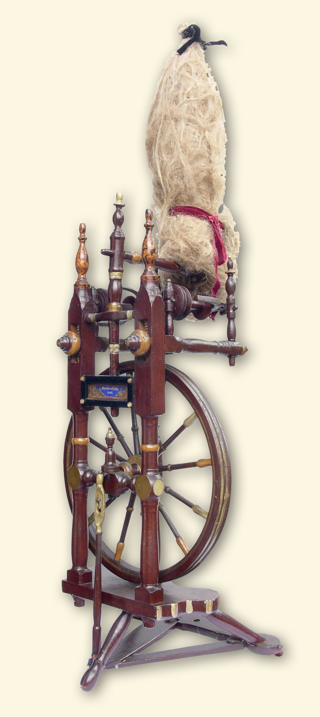 Spinning wheel, labeled Caroline Duling 1893 (de: Hochzeits-Spinnrad)